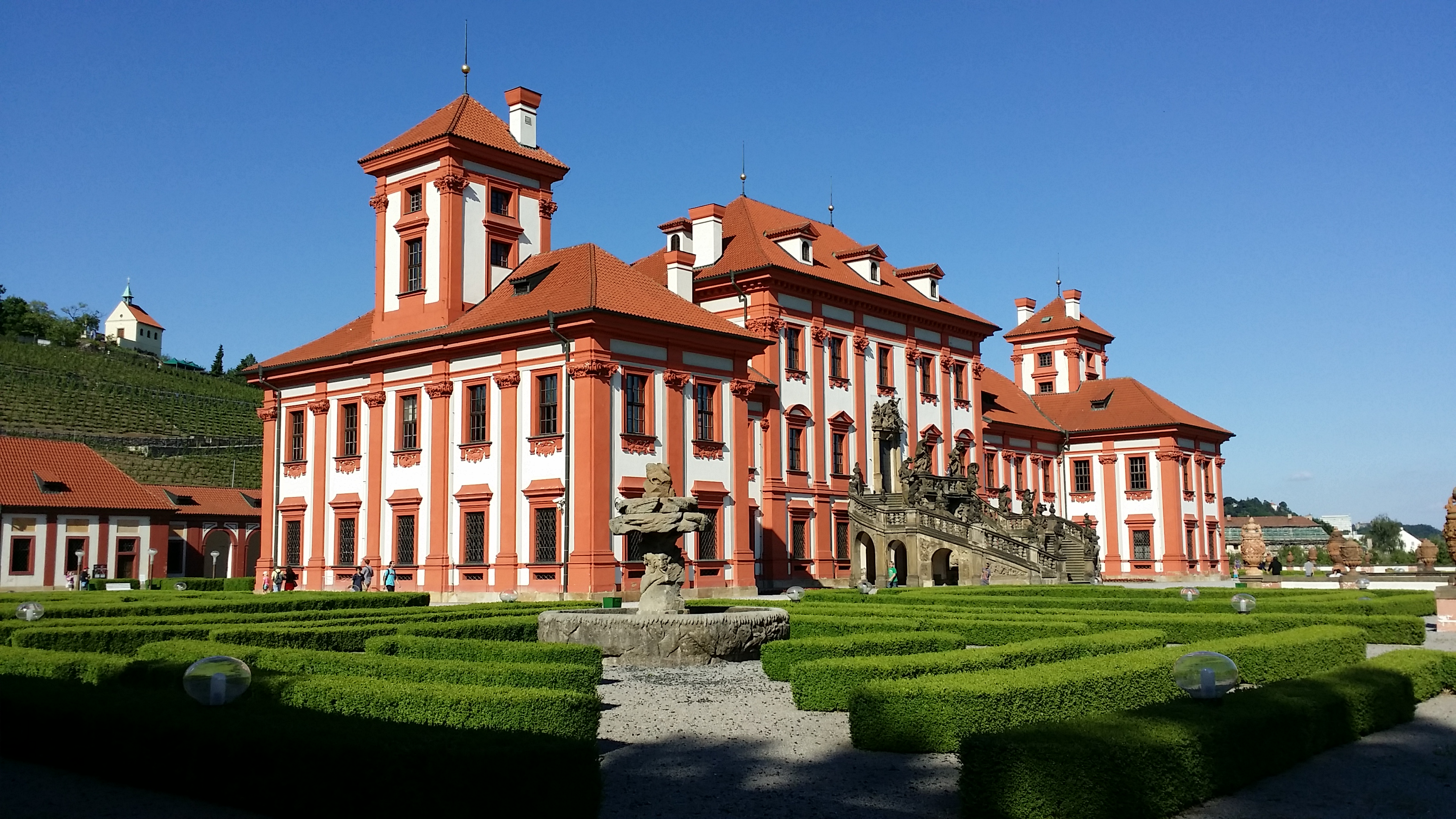 Trojský zámek, Troja, U Trojského zámku, Trojská, Povltavská 1/4, Troja.